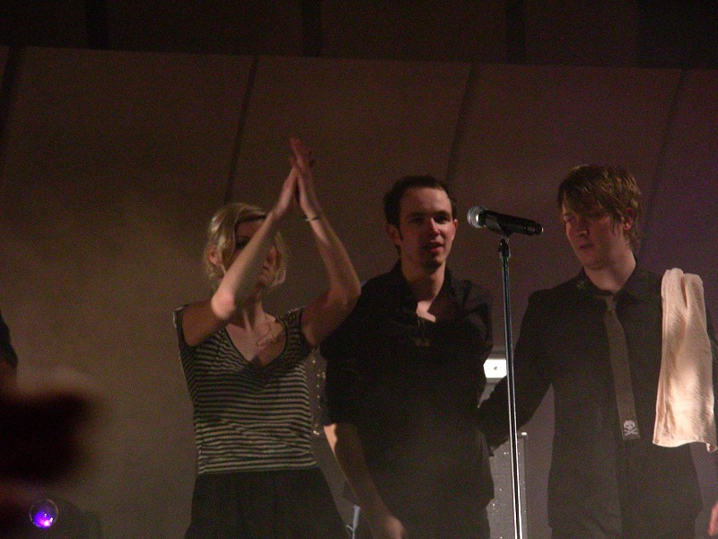 Juli am 21. Januar 2007 in der Phönix-Halle Mainz.